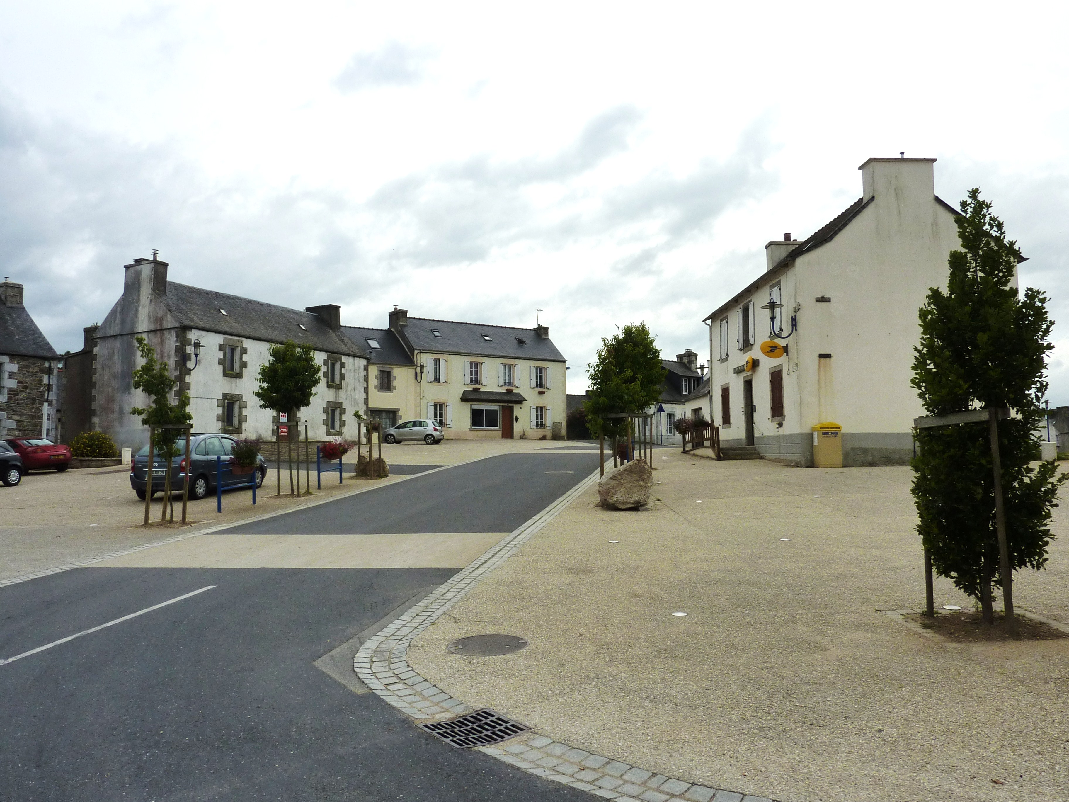 Scrignac: la place principale du village